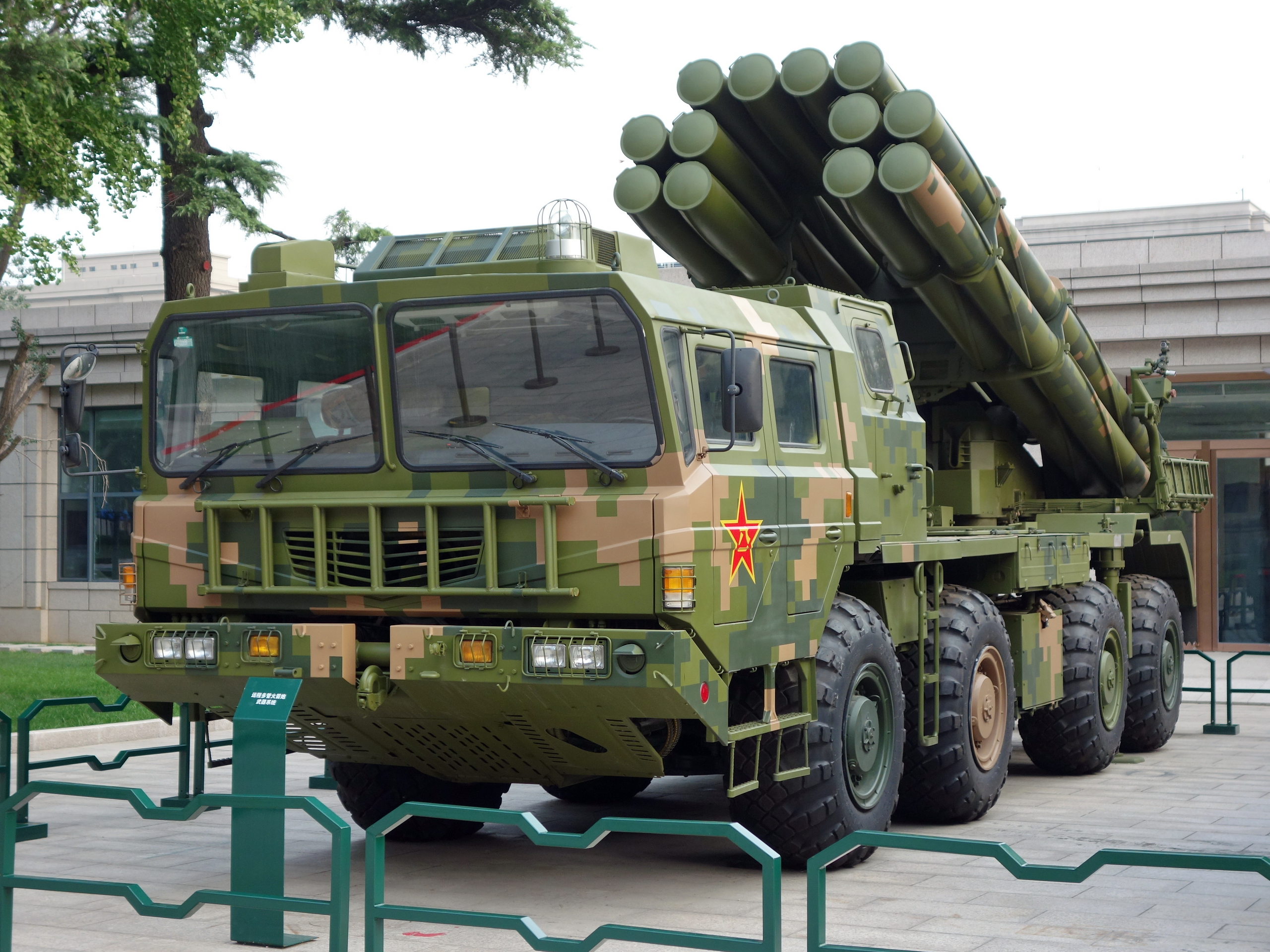 在中国人民革命军事博物馆纪念中国人民解放军建军90周年主题展览展出的PHL-03 300毫米远程多管火箭炮。